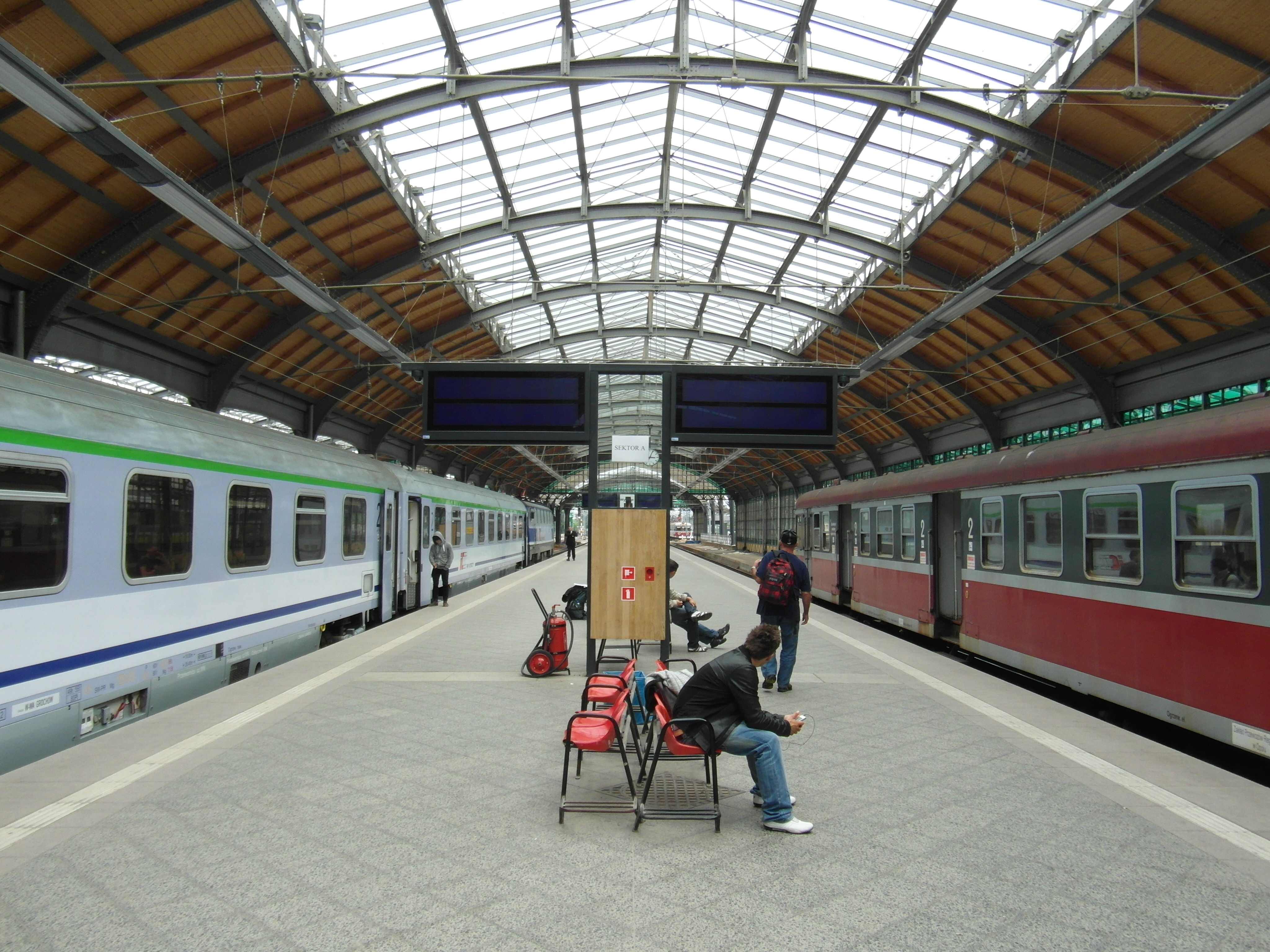 Wrocław - Dworzec Główny - stan po modernizacji 05/2012 Breslau - Hauptbahnhof - Stand nach Abschluss der Modernisierung - 05/2012